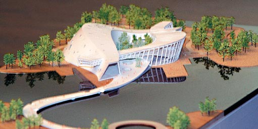 國立故宮博物院南部院區主體建築模型，姚仁喜設計。